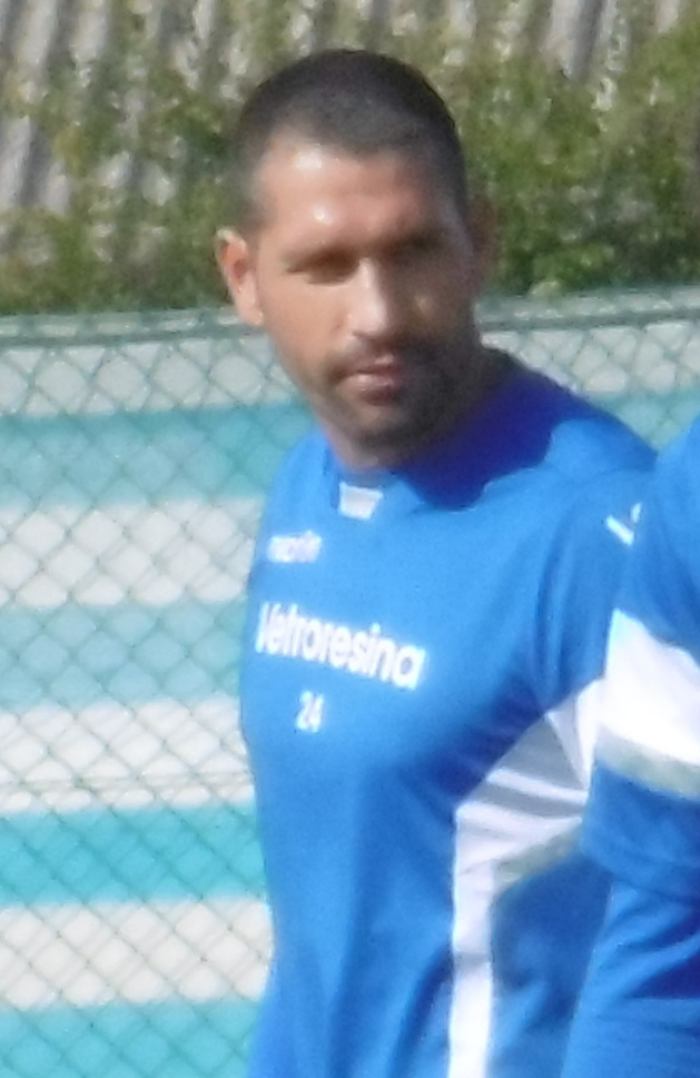 Alberto Paloschi e Marco Borriello